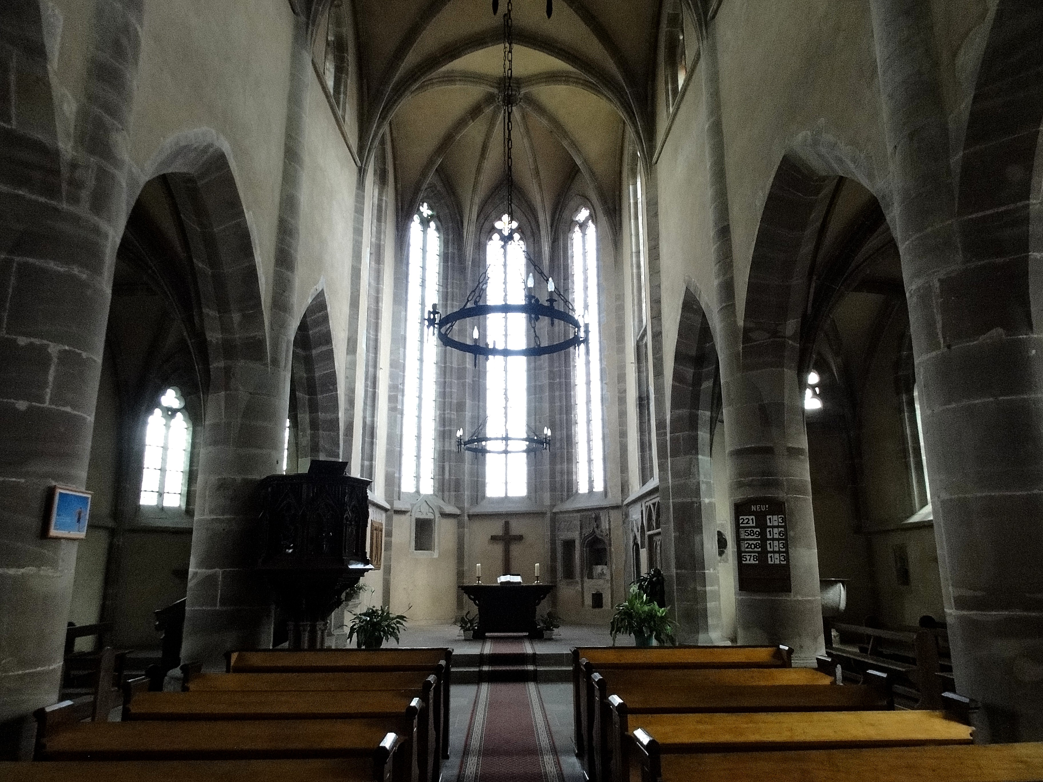 Alsace, Bas-Rhin, Église protestante Saint-Gall de Domfessel (PA00084693, IA67005785).Vue intérieure de la nef vers le chœur.